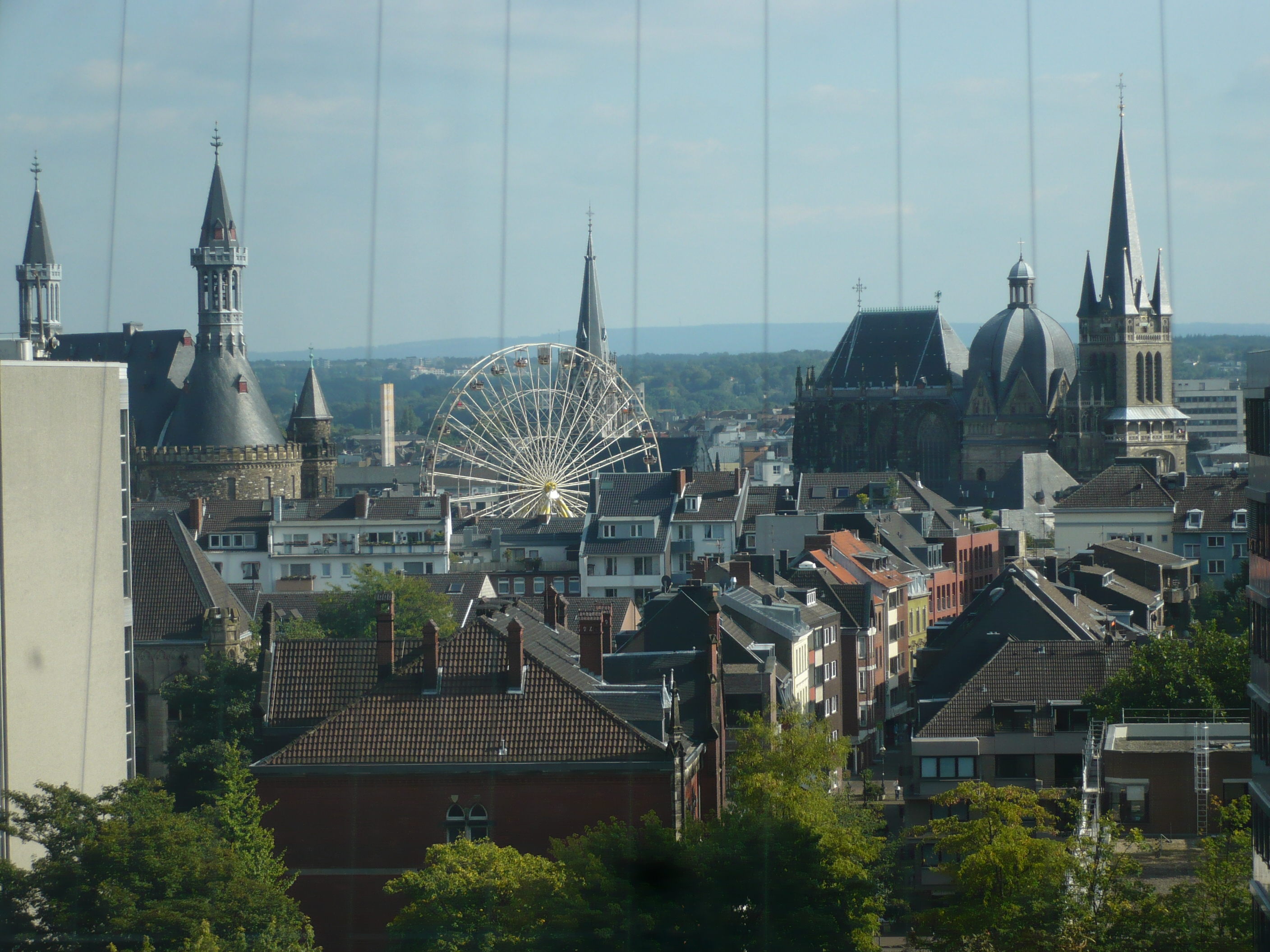 Blick über Aachen aus dem SuperC. Zwischen dem Aachener Rathaus links und dem Aachener Dom rechts stand im September 2008 auf dem Katschhof ein Riesenrad